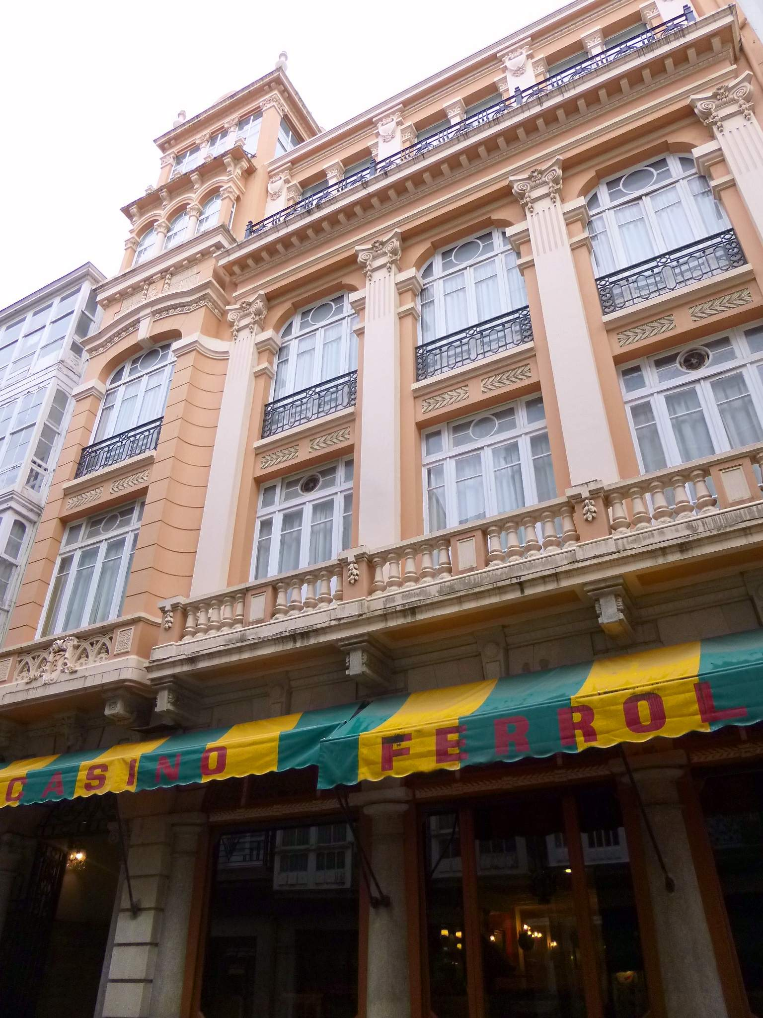 Ferrol - Barrio de La Magdalena - Casino Ferrolano